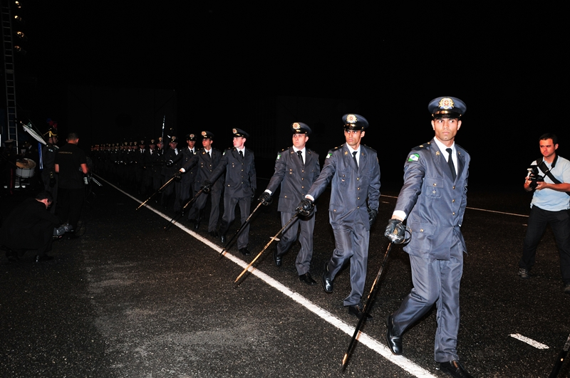 Formatura dos Aspirantes 2009 da PMPR.